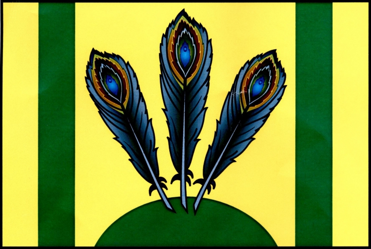 vlajka, Blížkovice, okres Znojmo